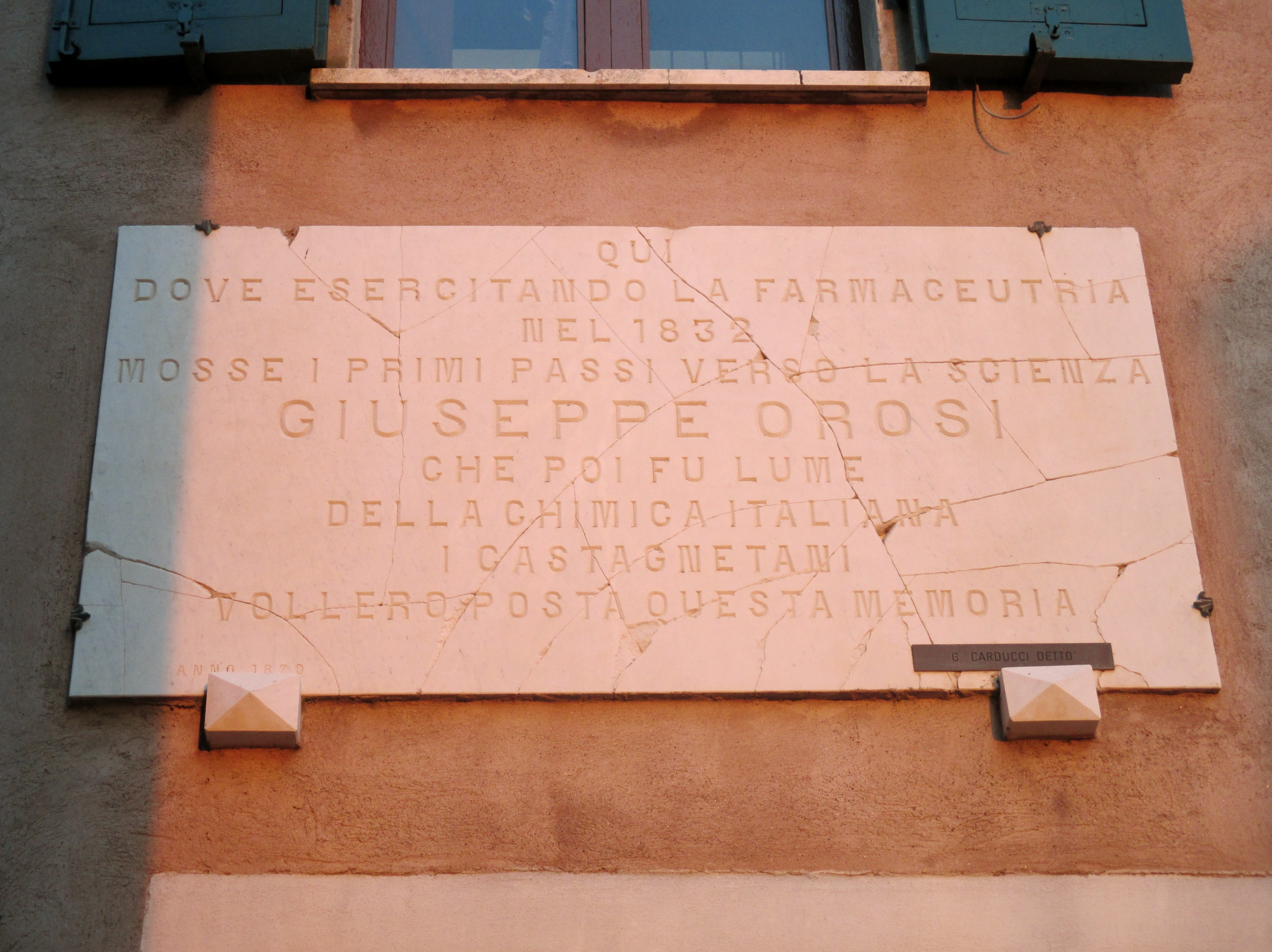 Castagneto Carducci, targa in marmo in ricordo del chimico Giuseppe Orosi, che a Castagneto trovò un primo impiego dopo essersi laureato.